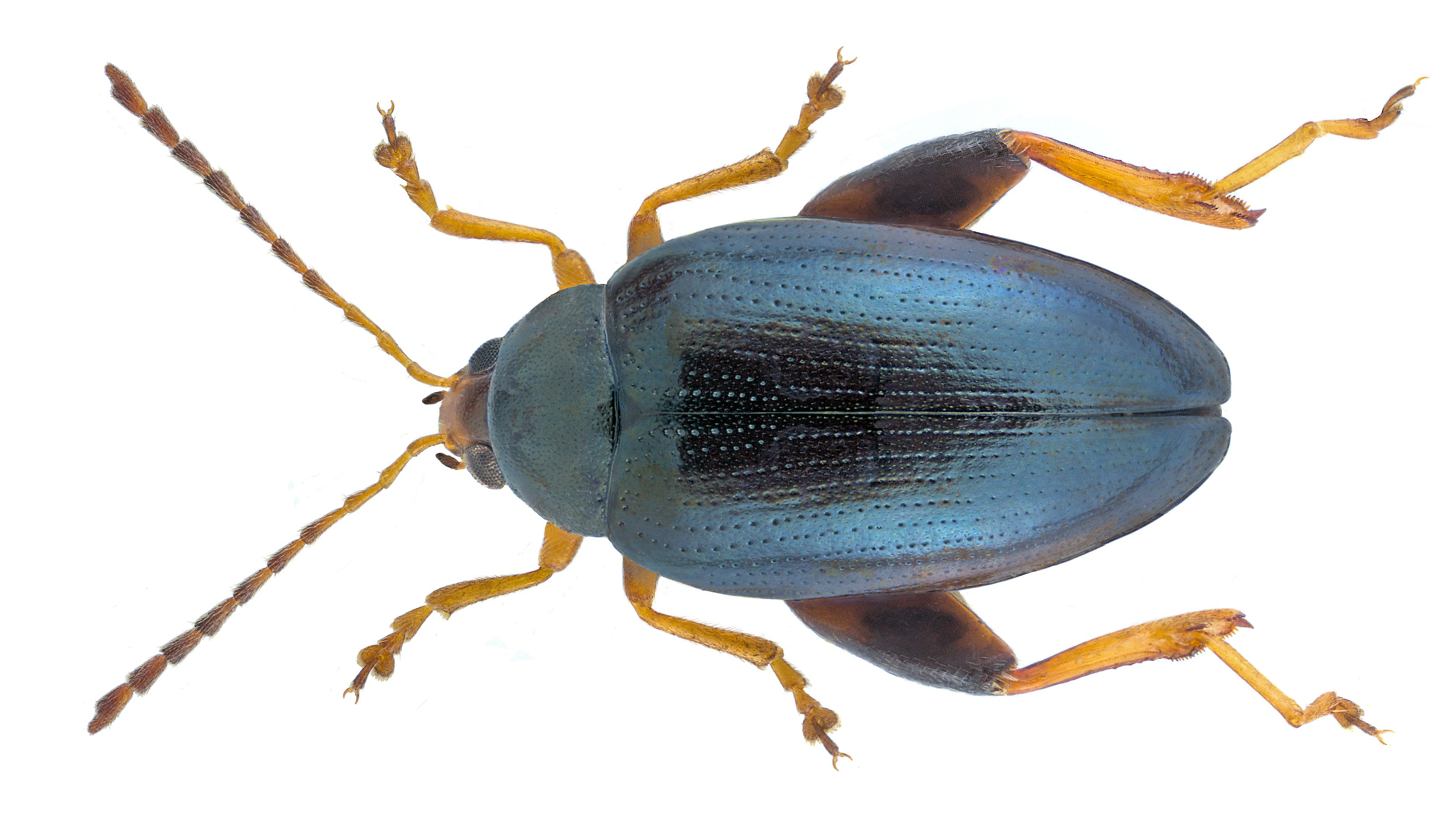 Psylliodes chrysocephalus (Linné, 1758) Familie: Chrysomelidae Groesse: 3-4,5 mm Verbreitung: Europa Oekologie: auf Cruciferen Fundort: Germania, Bayern, Oberfranken, Selbitz leg. U.Schmidt, 23.VII.2003; det. U.Schmidt, 2003 Photo: U.Schmidt, 2011